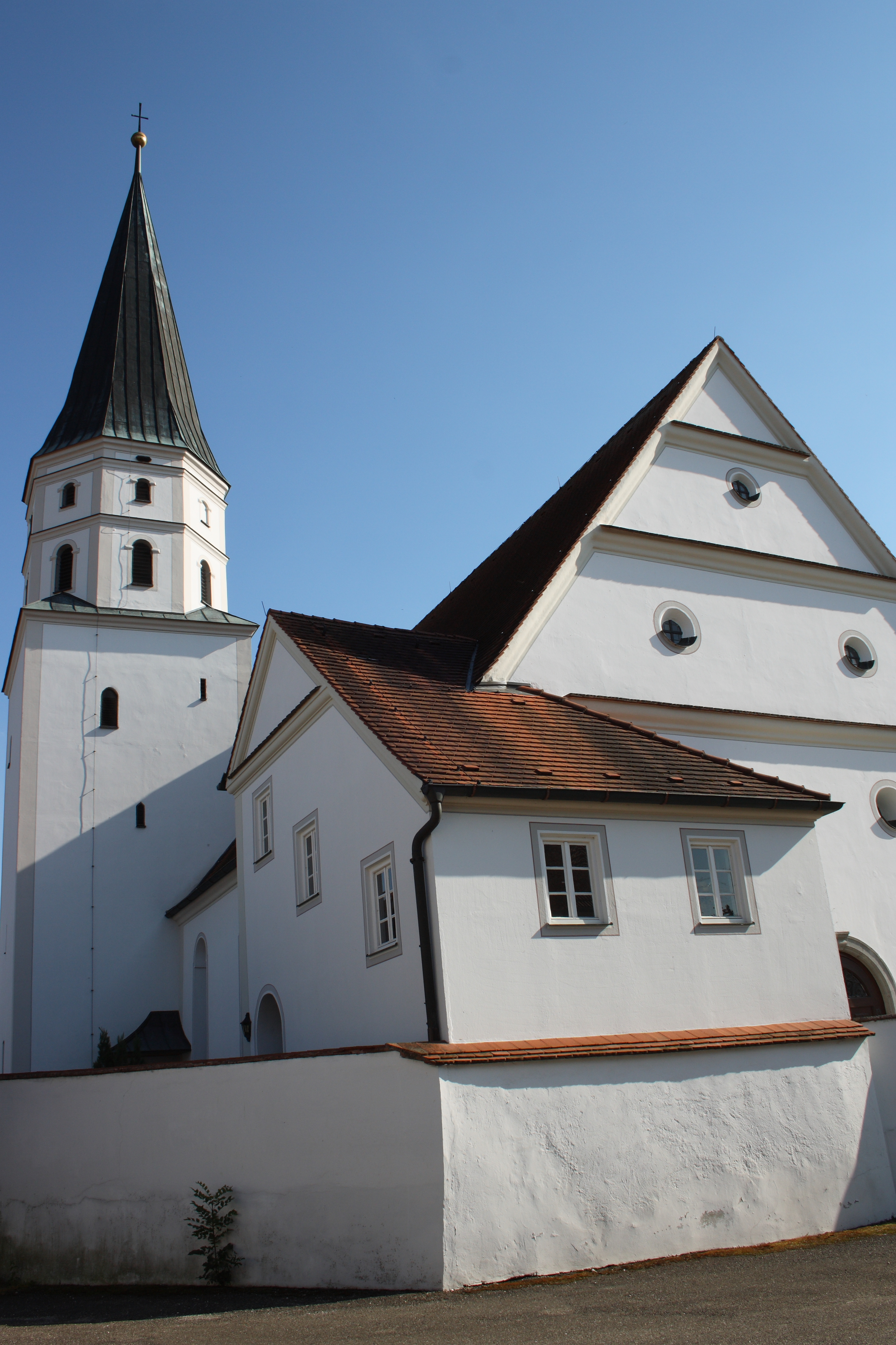 Katholische Filialkirche St. Vitus in Erlingshofen, einem Ortsteil von Tapfheim im Landkreis Donau-Ries (Bayern)